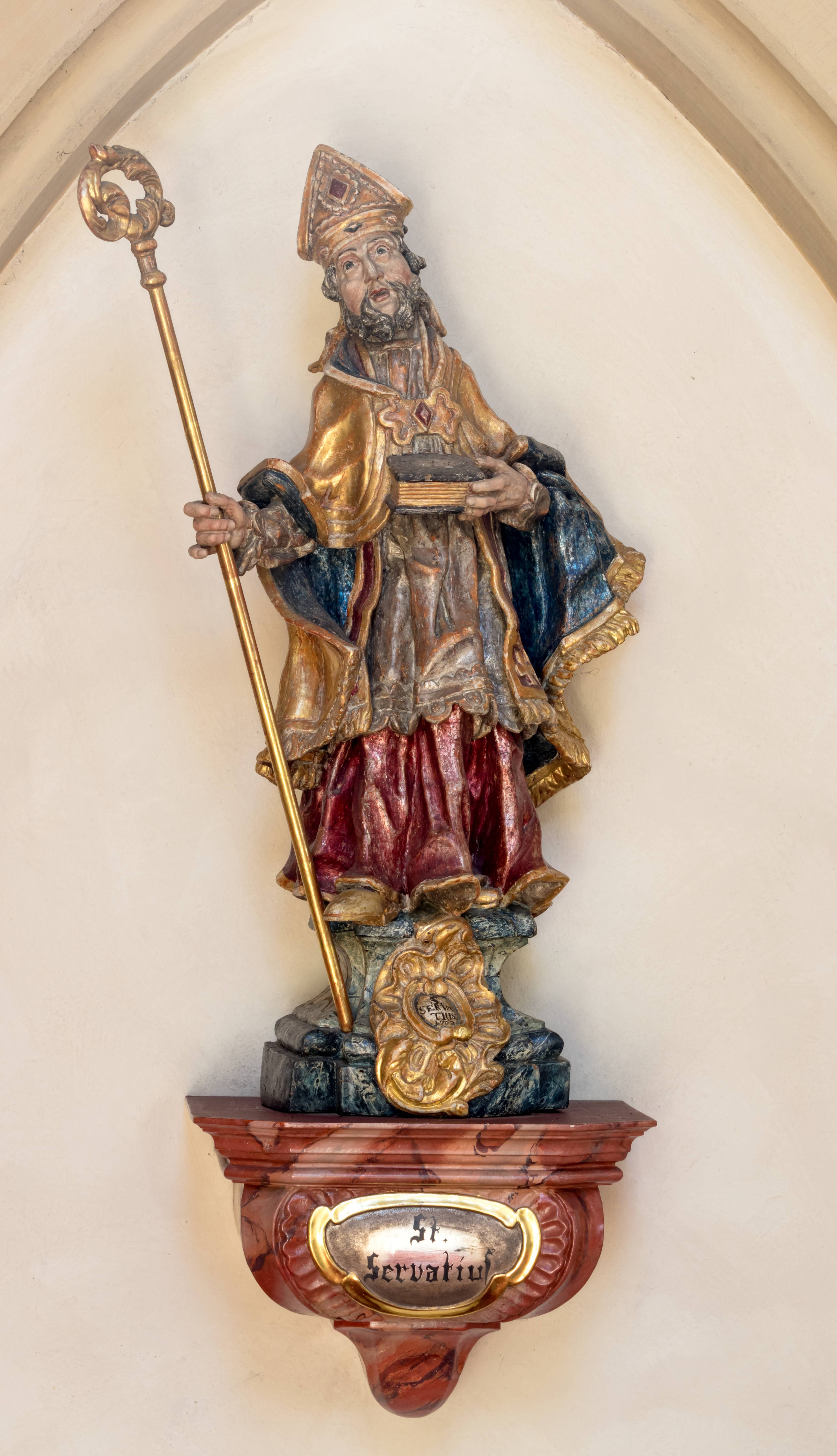 Bilder von St. Columba. in Pfaffenweiler St. Servatius